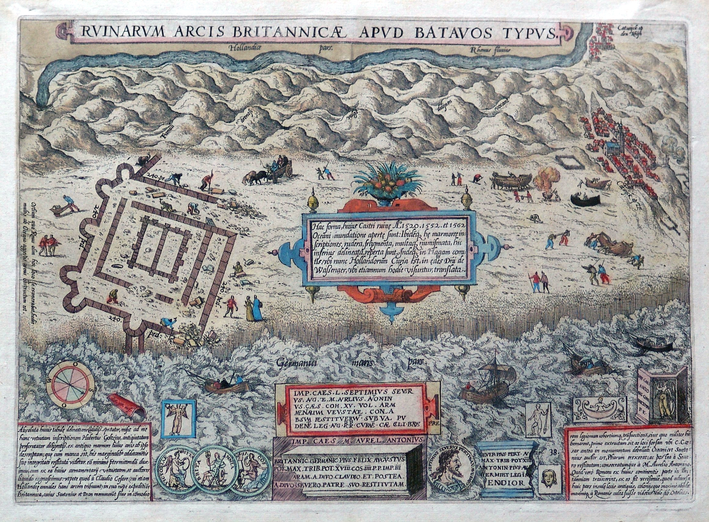 De Brittenburg naar Abraham Ortelius. Deze gravure komt uit Guicciardini's beschrijving van de Nederlanden, uitgegeven vanaf 1582 tot 1588